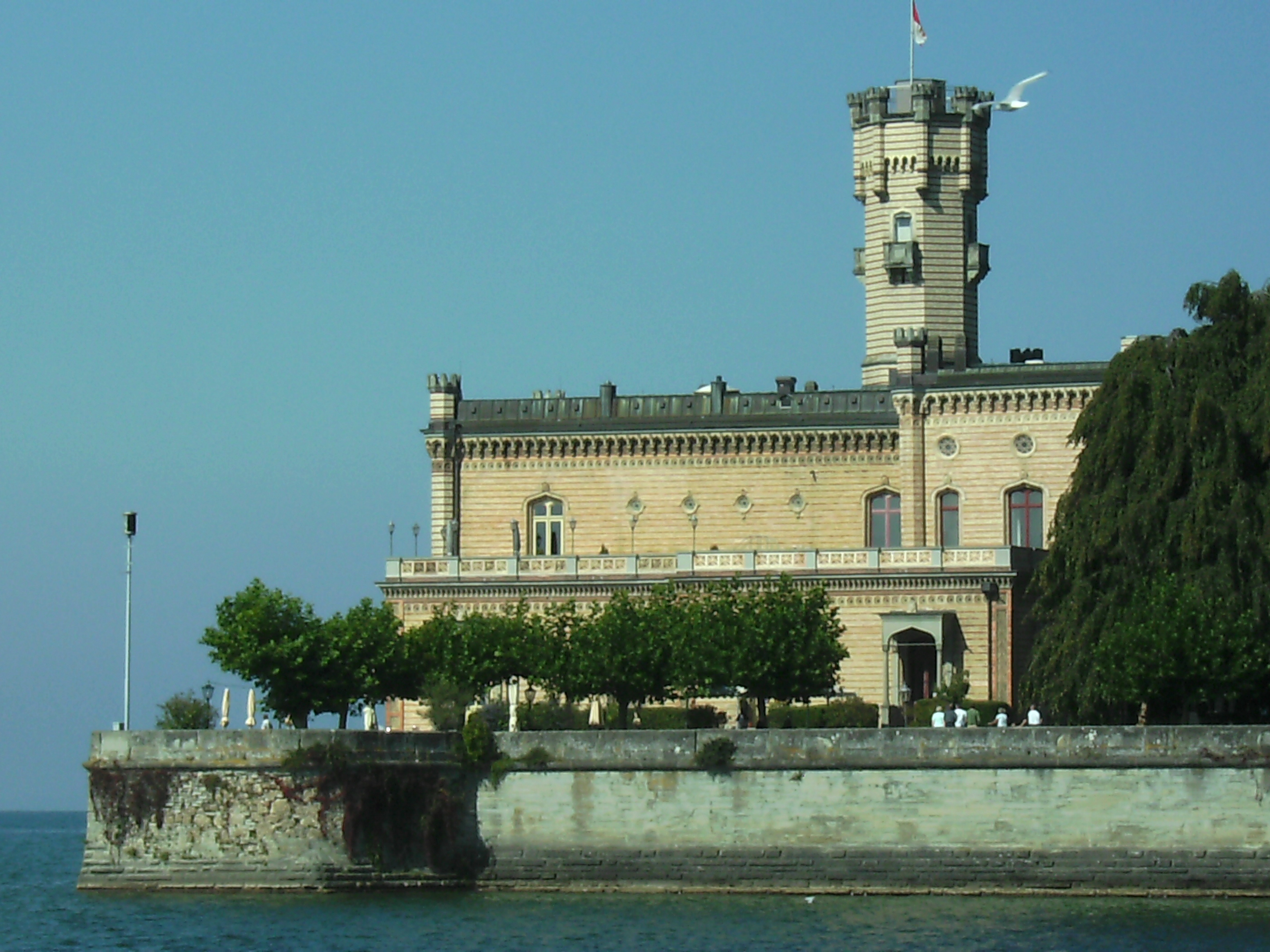 Langenargen: Schloss Montfort